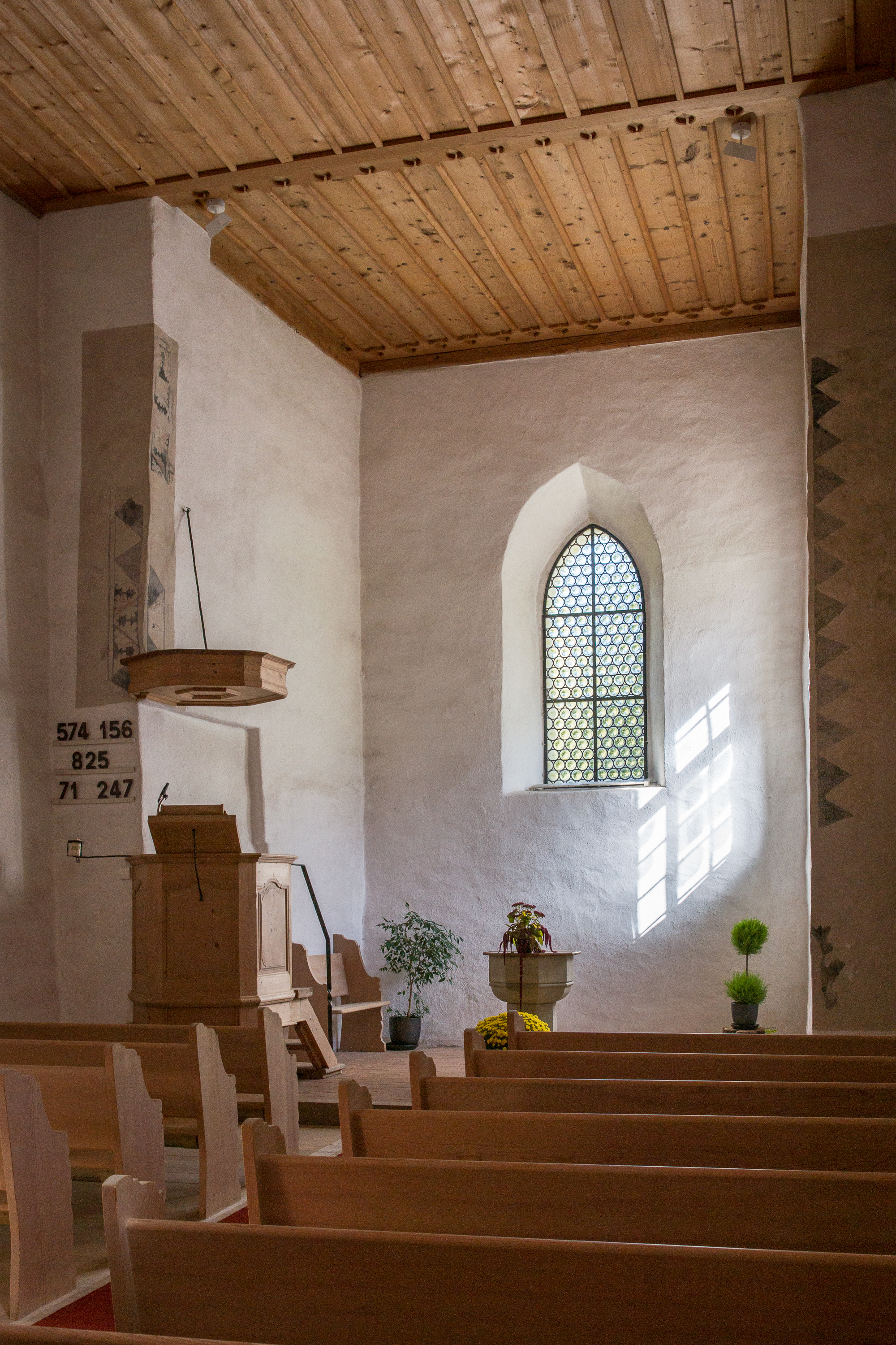 Reformierte Kirche, schlichte Inneneinrichtung